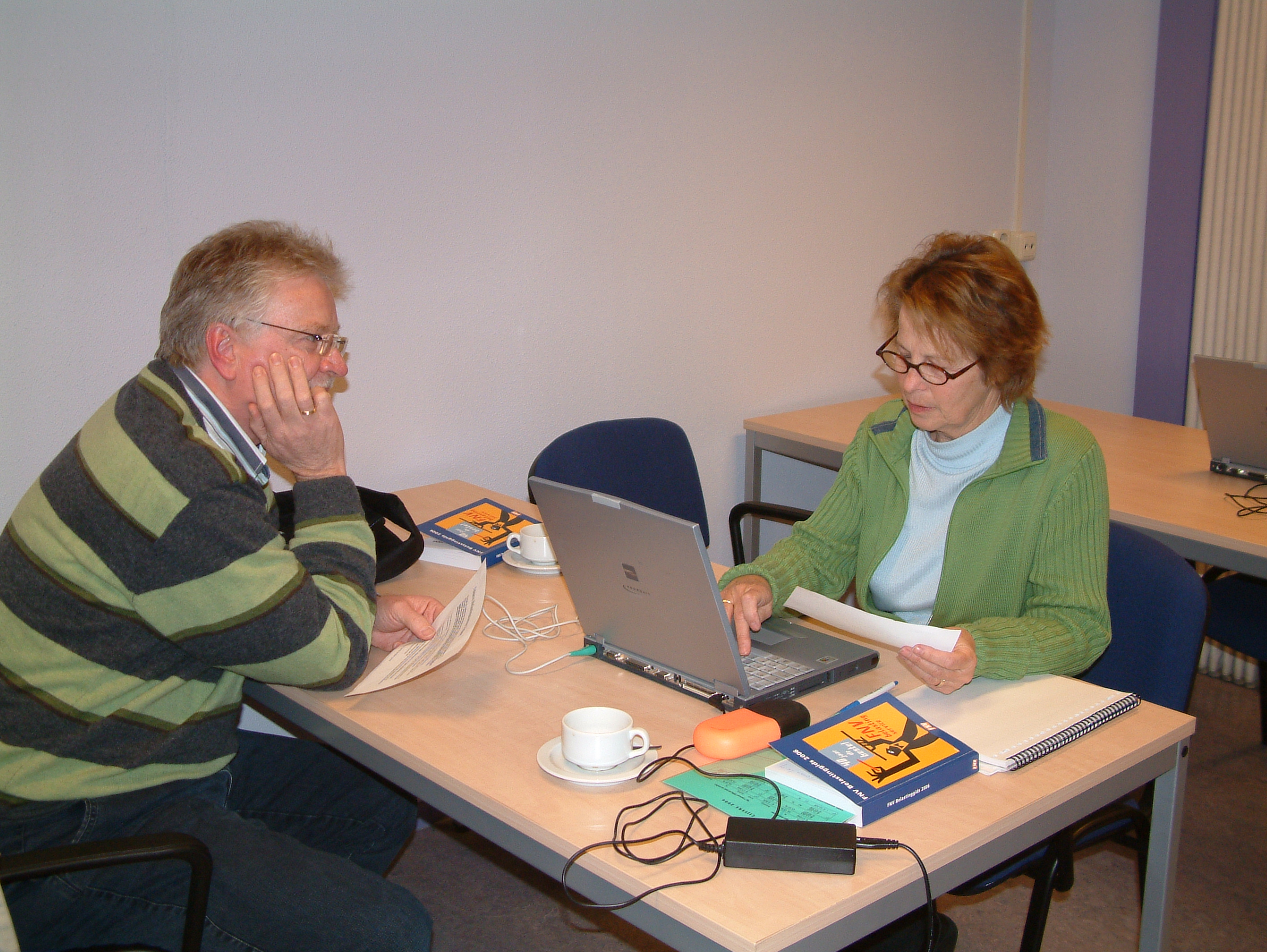 Het invullen van een aangifte bij FNV Belastingservice